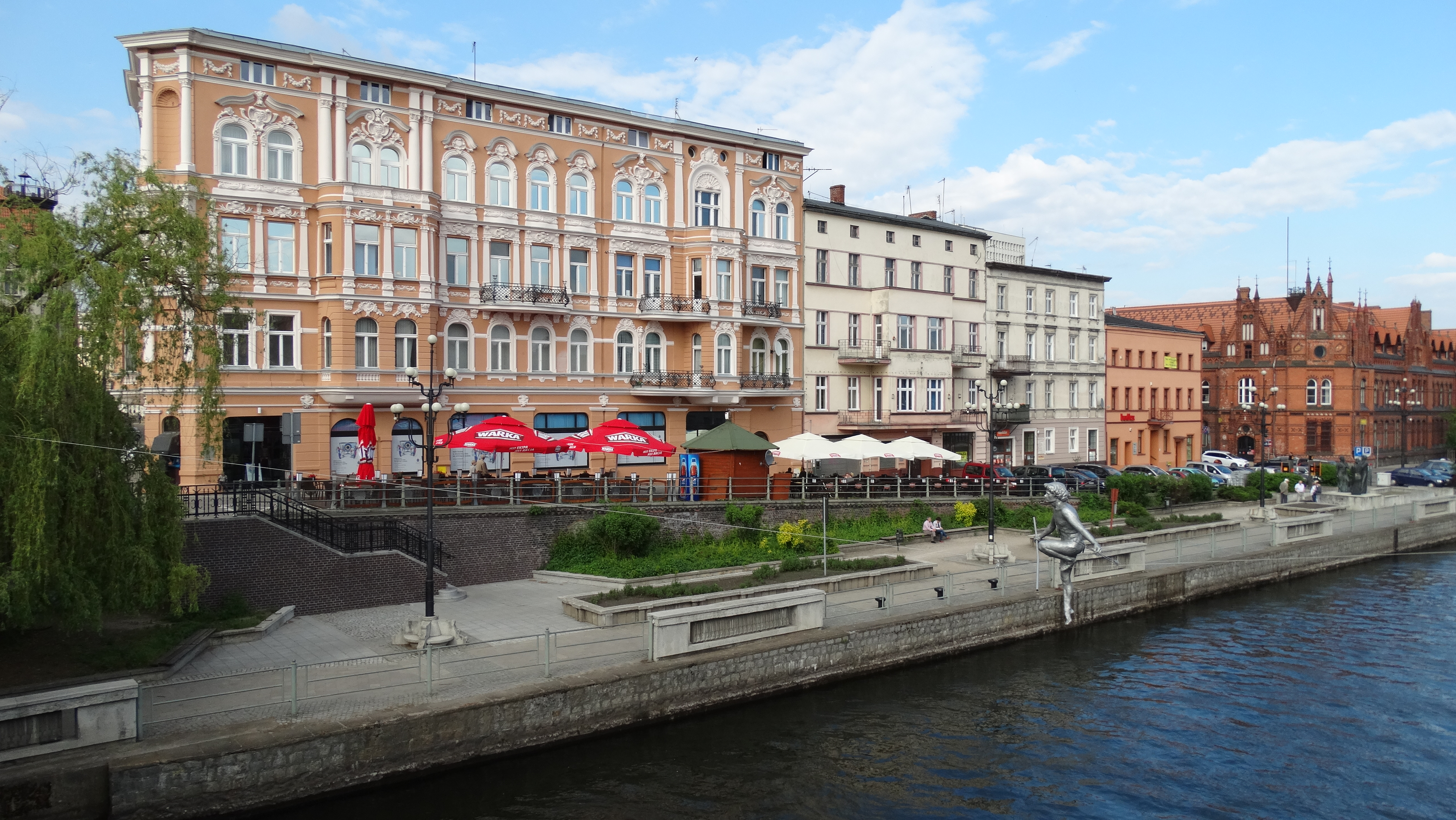 Bydgoszcz, dom, 1897-1905